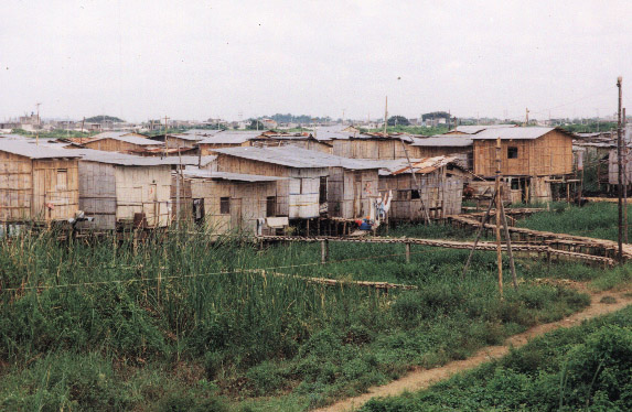 Bastión Popular. Guayaquil. Viviendas en las partes bajas, construidas sobre palafitas.